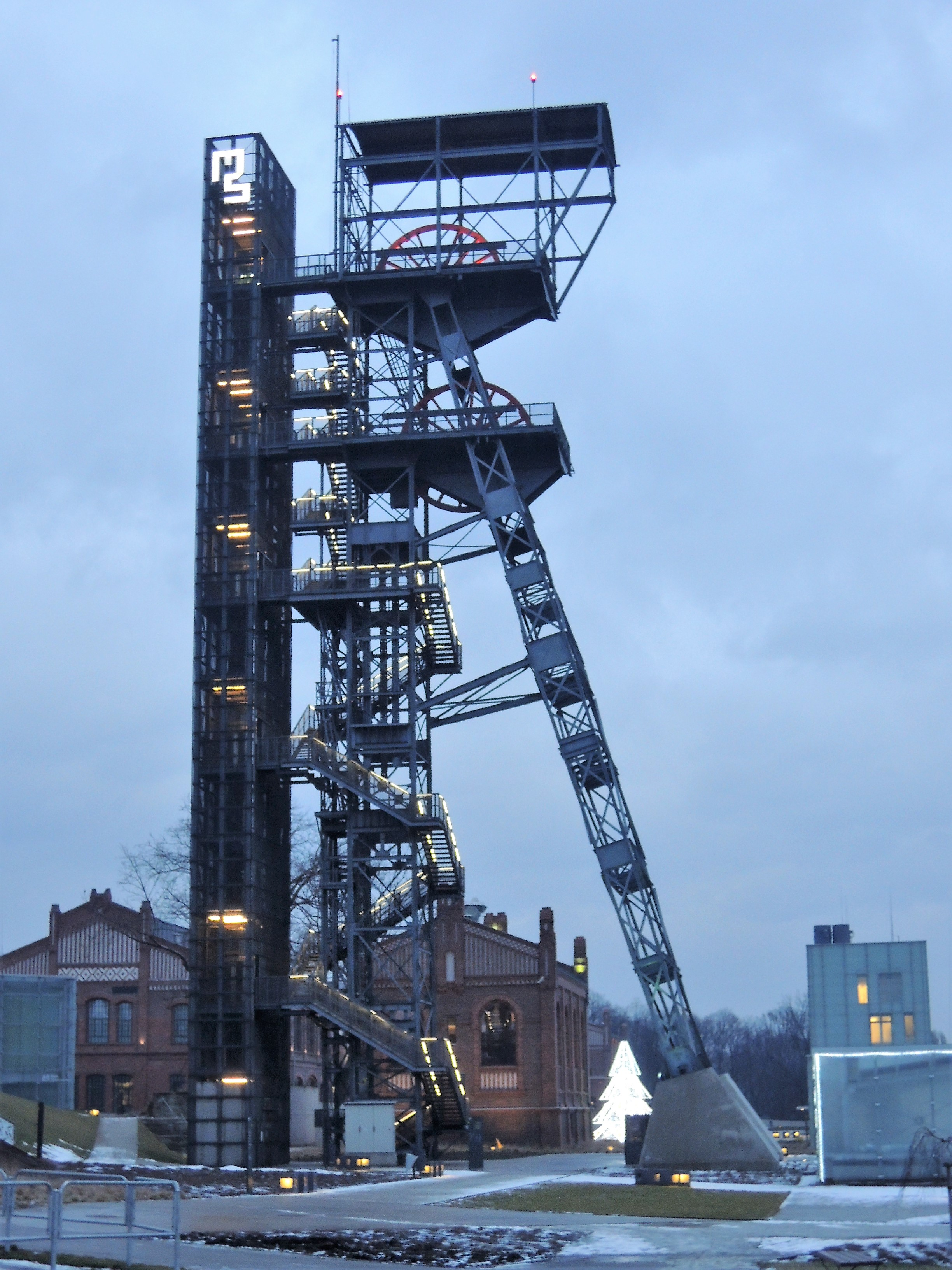 Szyb "Warszawa II" dawnej KWK "Katowice, obecnie na terenie Muzeum Śląskiego. Szyb pełni funkcję wieży widokowej.